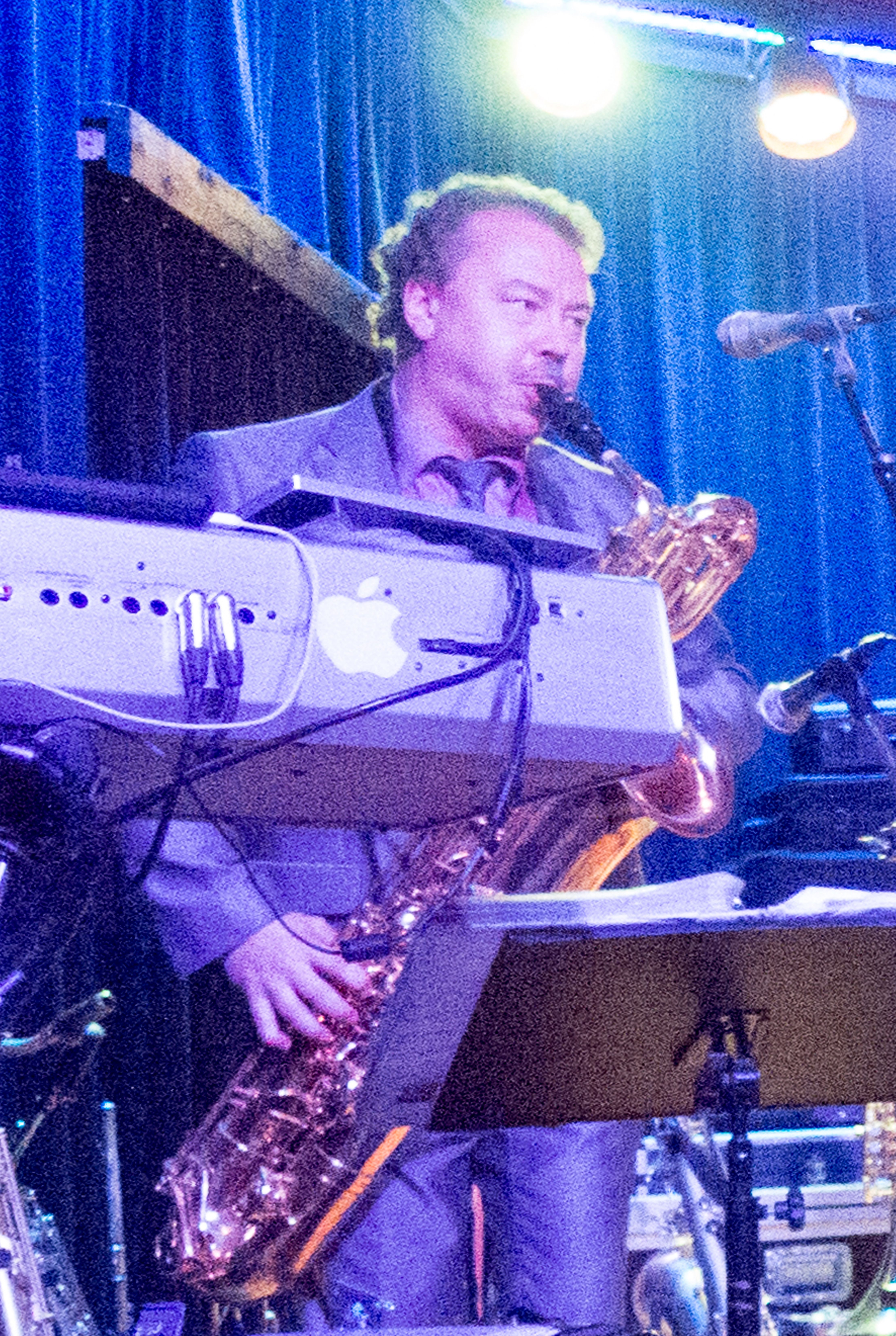 Lasse paasikko suomalainen puhallinsoittaja